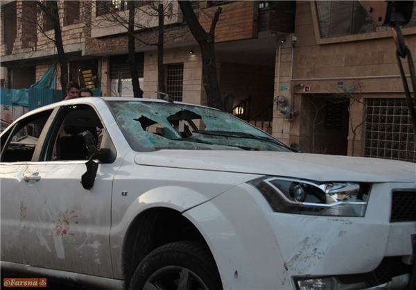 تصویر ماشین تخریب شده مصطفی عبدی درویش گنابادی در واقعه گلستان هفتم که در خبرگزاری فارس نیوز منتشر شد.